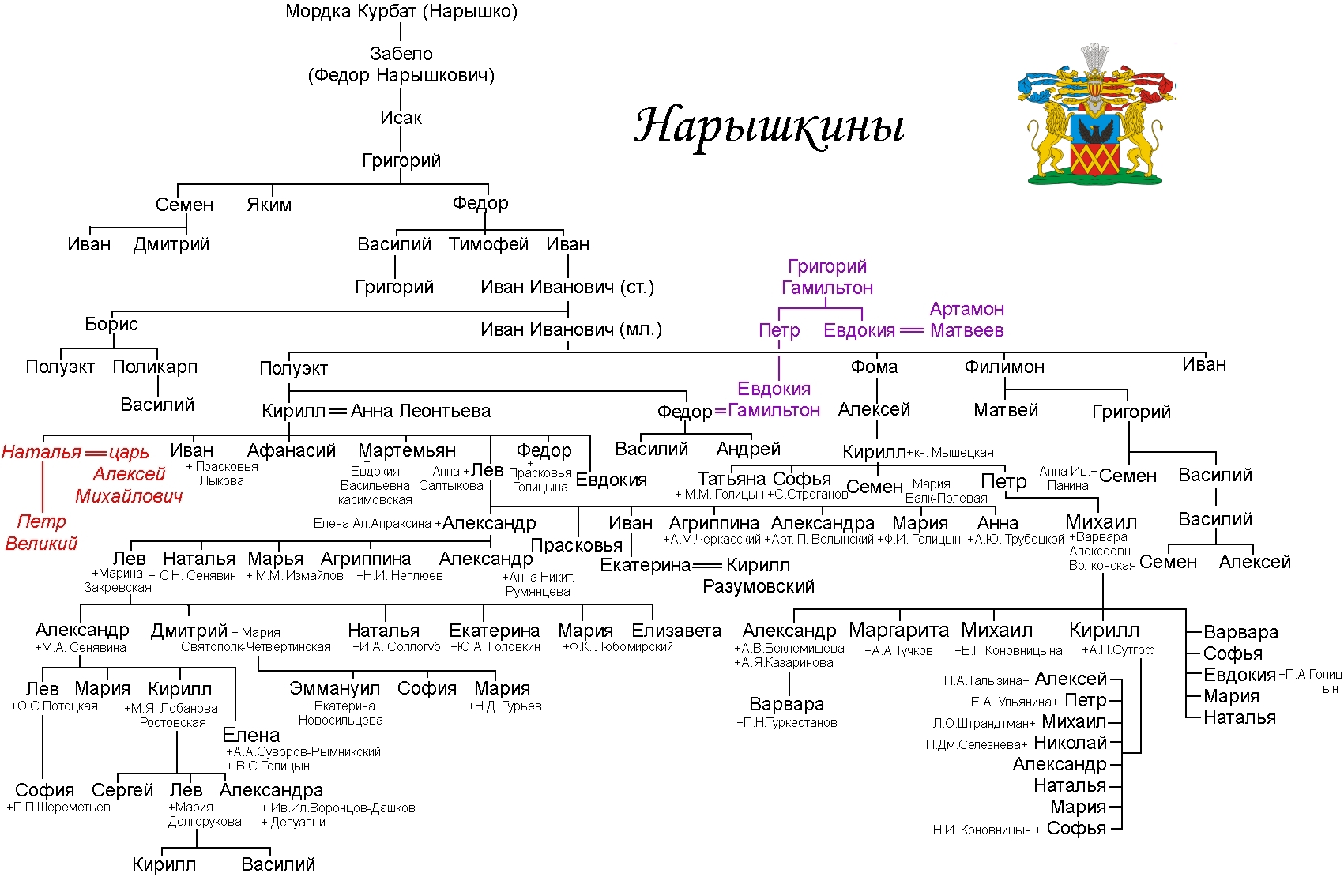 Родословное (генеалогическое) древо дворянского рода Нарышкиных (до конца 19 века)